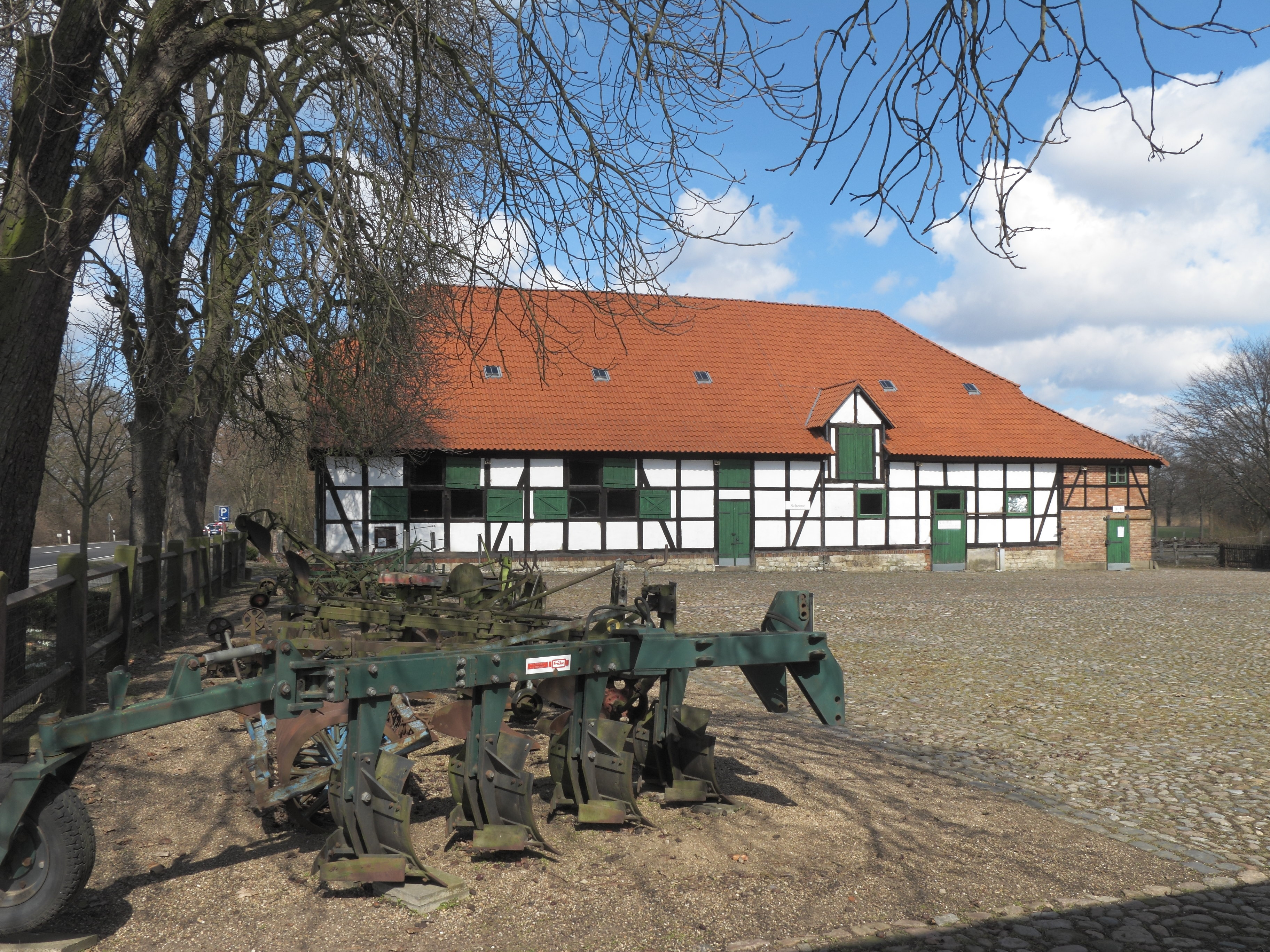 Braunschweig Watenbüttel, Gut Steinhof, Landtechnik-Museum. Im Hintergrund: die Durchfahrtsscheune.